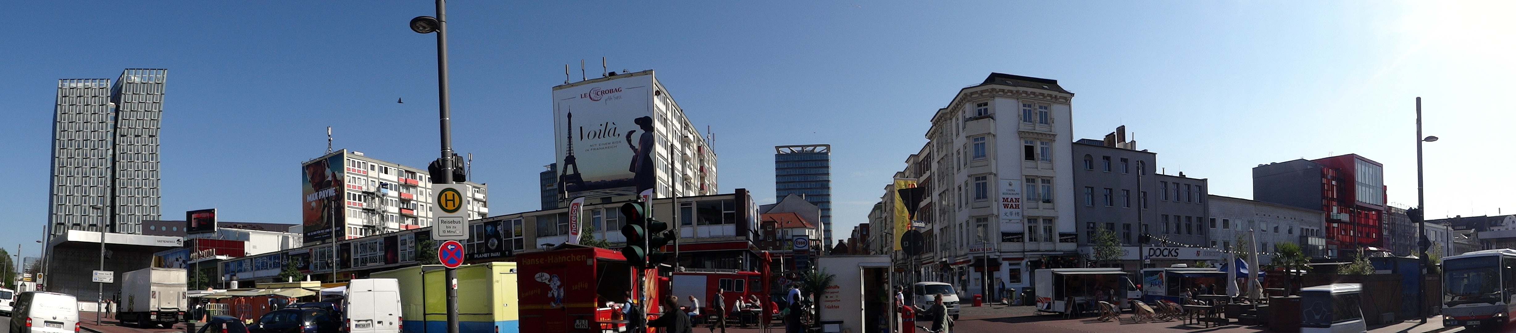 Der Spielbudenplatz (mit Markt am Mittwoch abend), links die Tanzenden Türme.